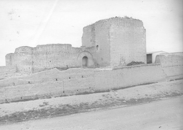 Castillo - Fuente el Sol (Valladolid) - Álbum 200 x 140 - Fotografía. Papel 125 x 90 B/N